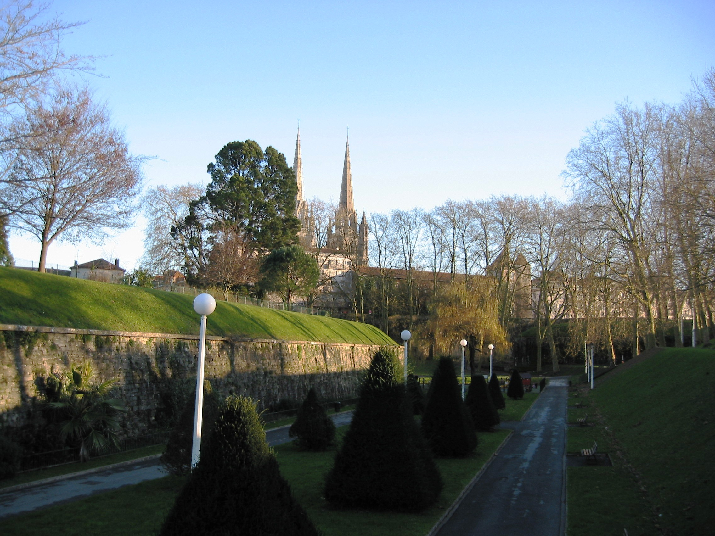 Bayonne, les remparts. Photo prise le 03/01/05 par Harrieta171